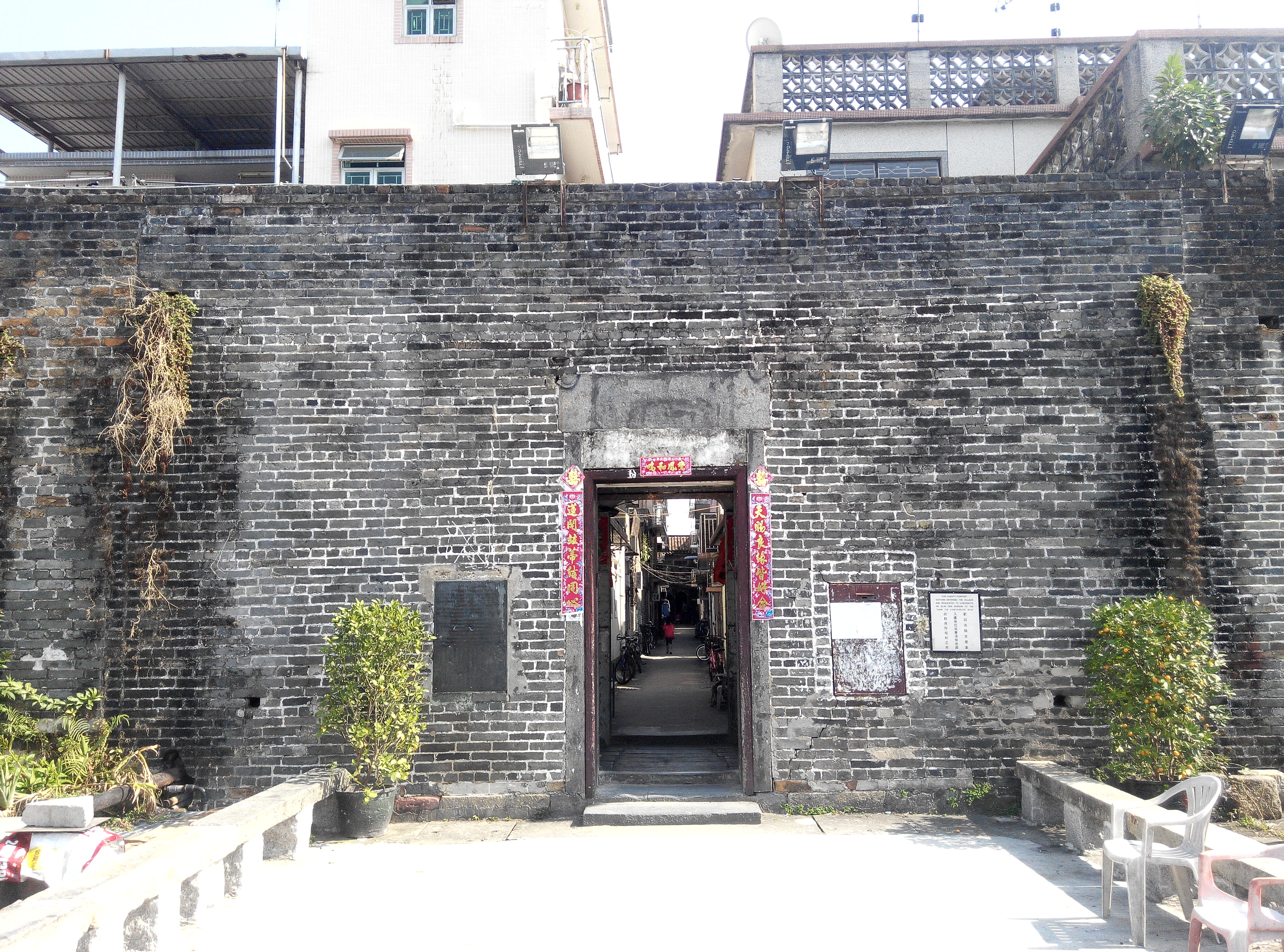 中文（香港）: 吉慶圍圍門